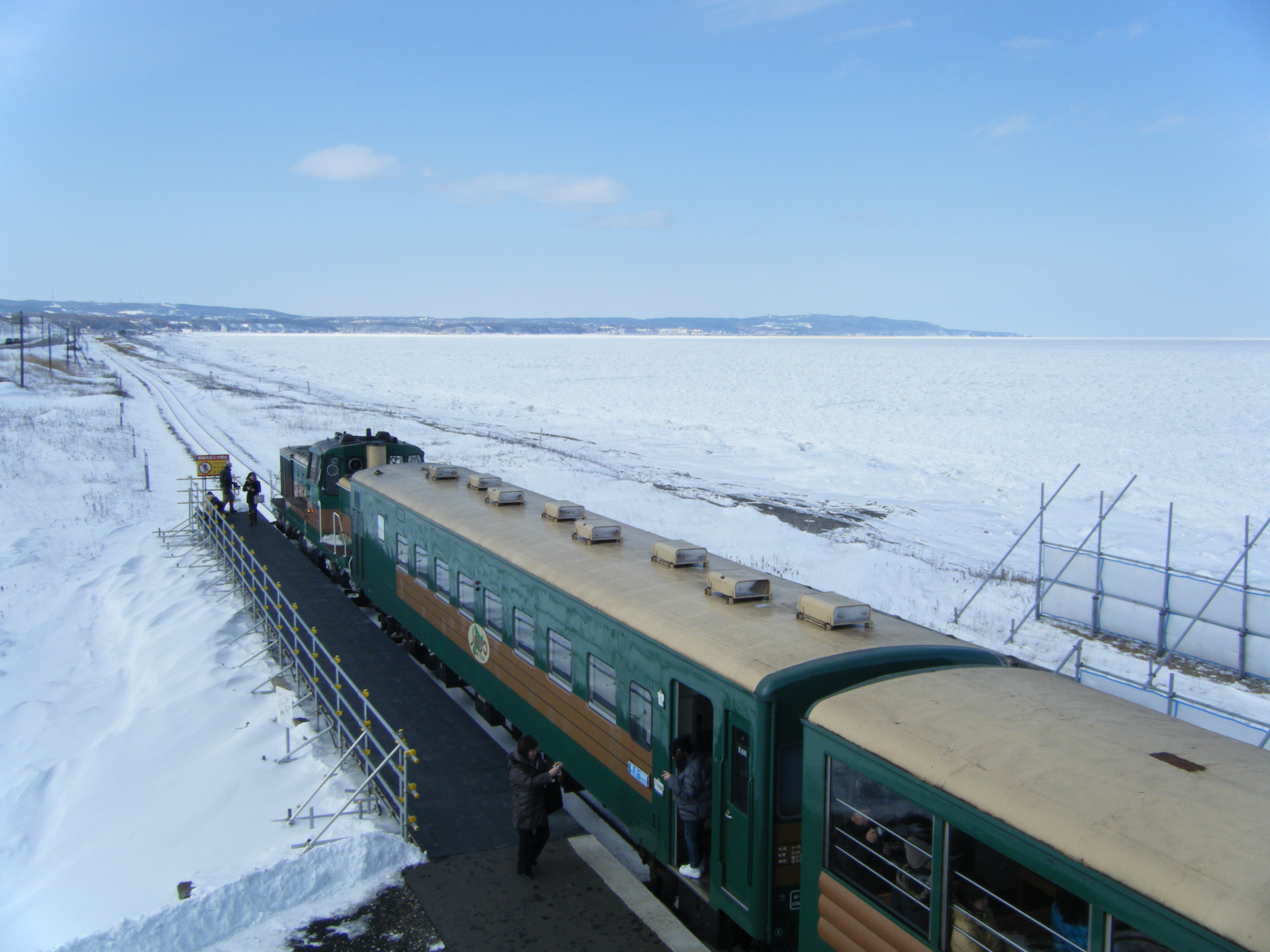 流氷ノロッコ号と流氷。北浜駅展望台にて撮影。